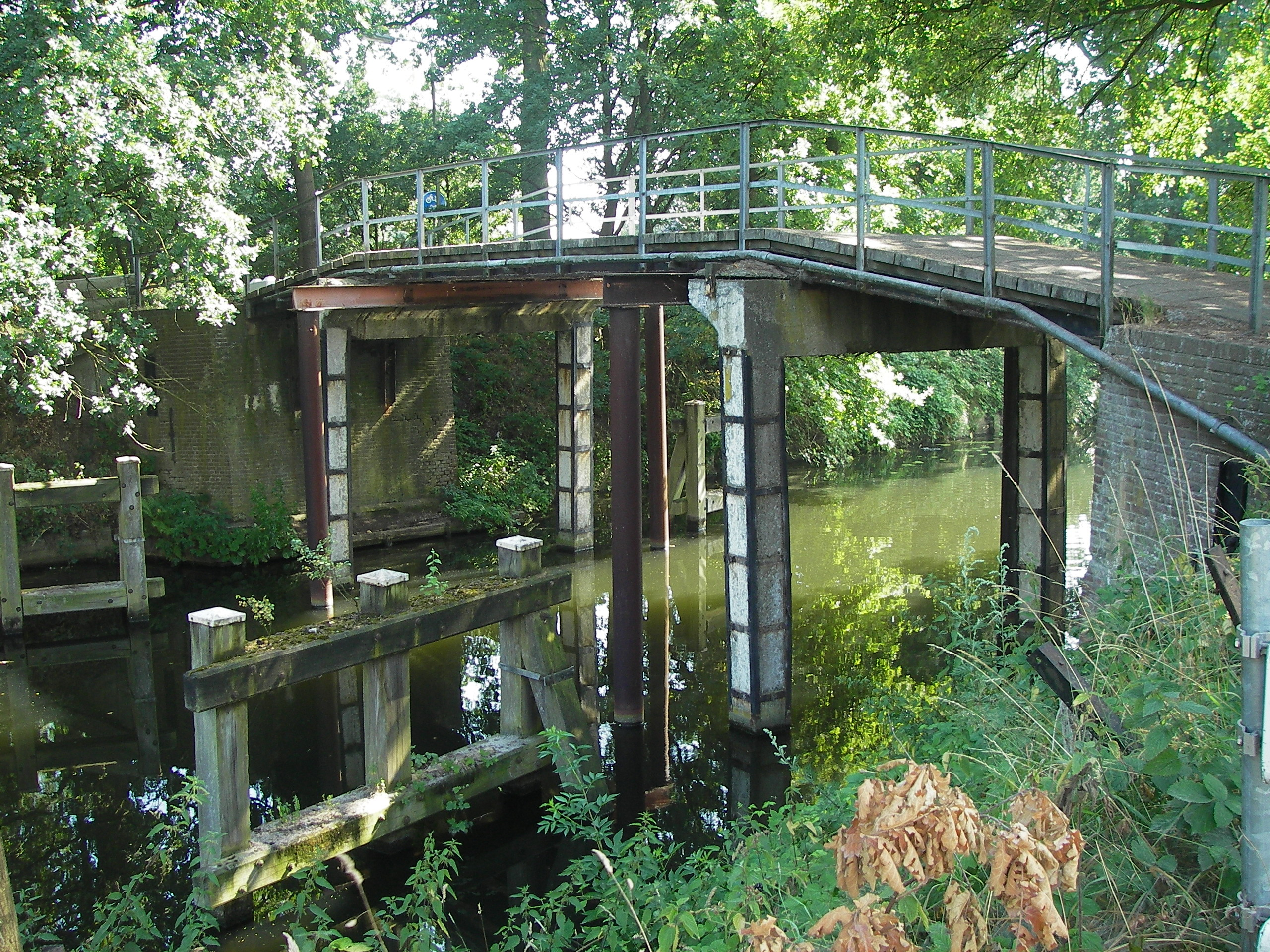 Zeer oud bruggetje over het Eindhovensch kanaal ter hoogte van Brandevoort